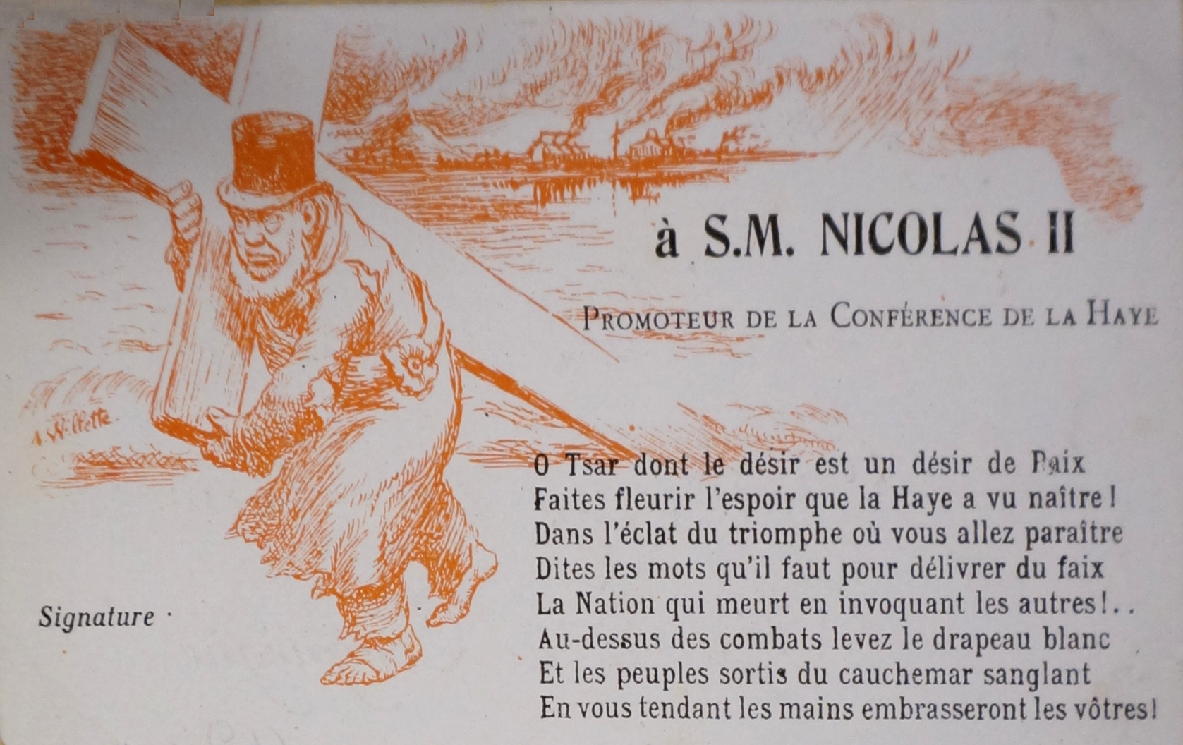 carte postale édité lors du Voyage de Nicolas II en France en 1901.